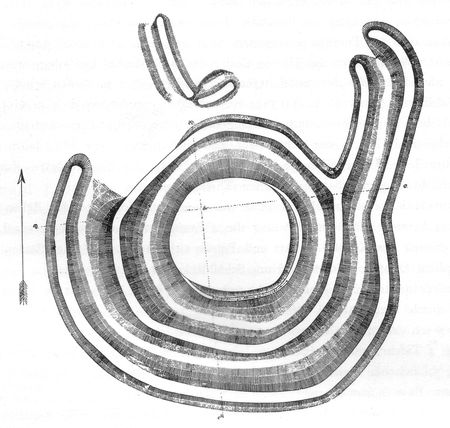 Alte Warburg